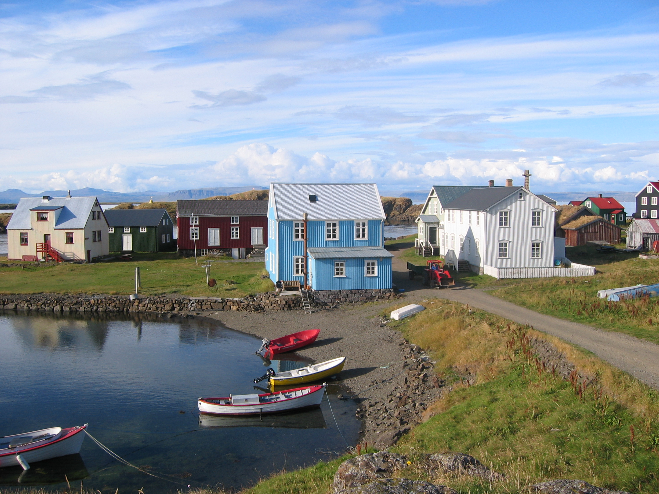 Flatey á Breiðafirði – Plássið við Grýluvog; yst til vinstri Eyjólfshús, næst Stórapakkhús (brúnt) og samkomuhúsið áfast því og fremst Vogur sem var aðsetur verslunarstjóra og prestsetur.